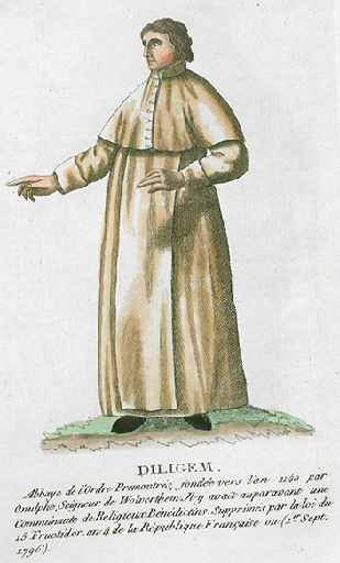 Collection de costumes de tous les ordres monastiques, supprimés à differentes époques, dans la ci-devant Belgique, Bruxelles, Philippe Joseph Maillart et sœur, 1811